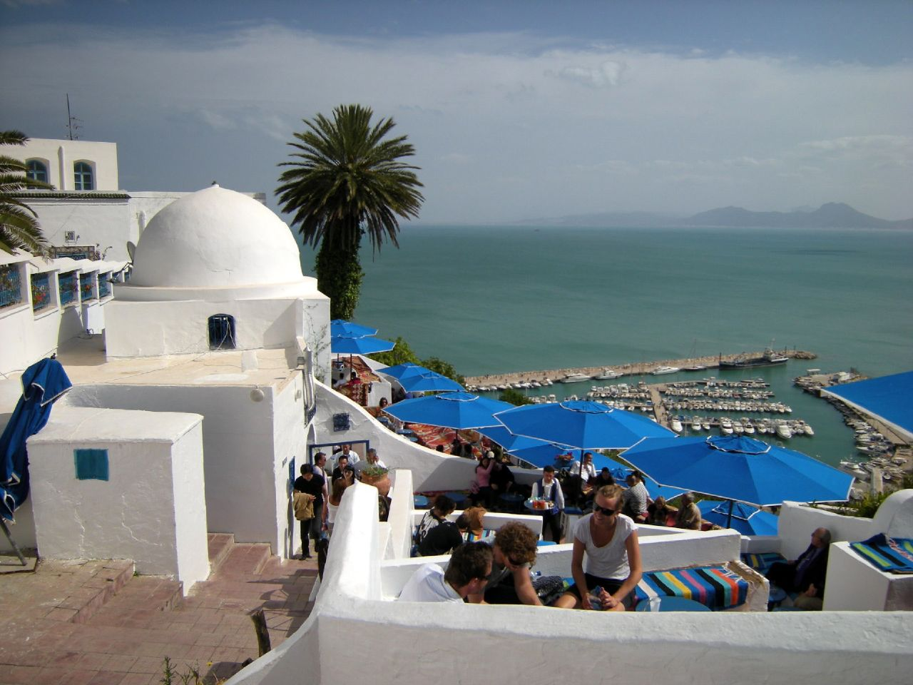 Bar em Sidi Bousaid - zoom